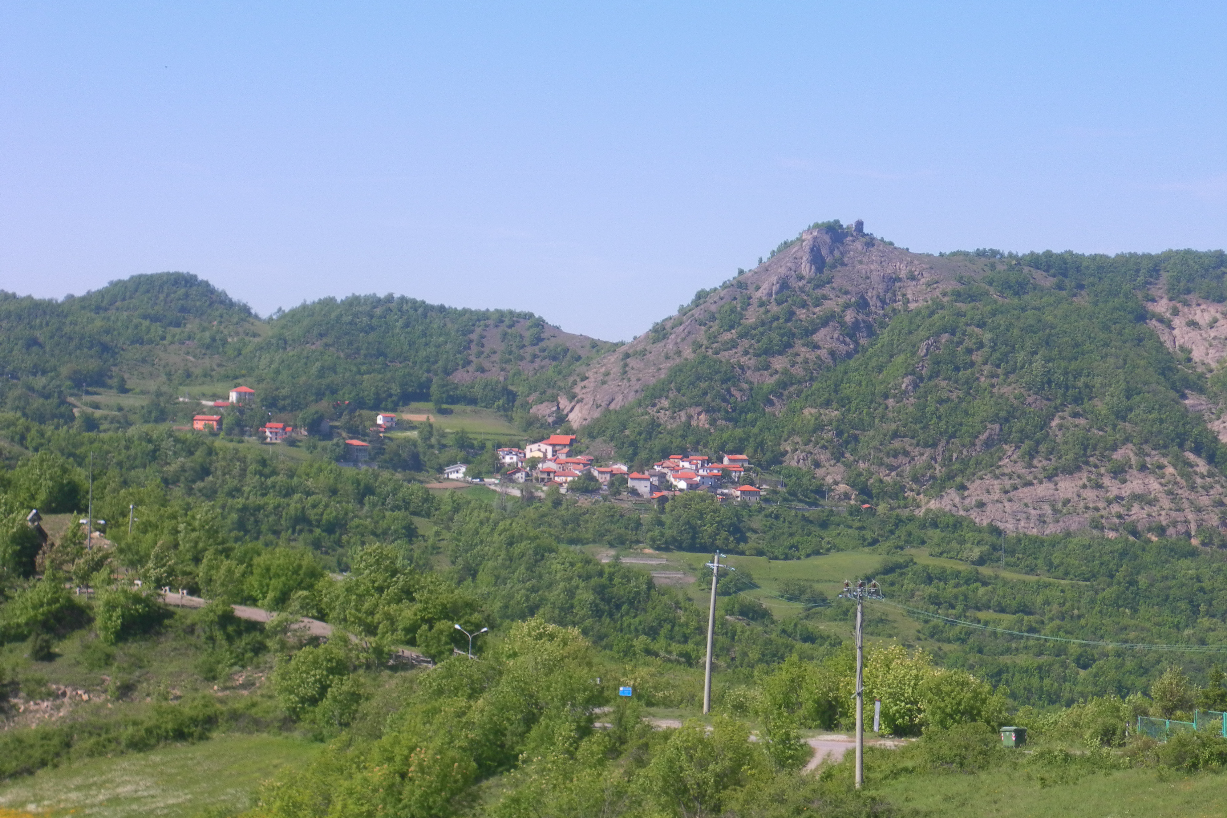 Vista di Roccaforte Ligure (AL)